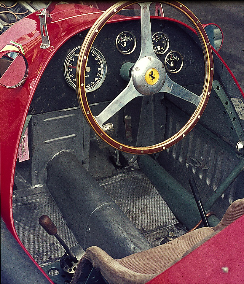 Ferrari 500, Baujahr 1953 (Cockpit) beim Oldtimer-Grand-Prix des AvD